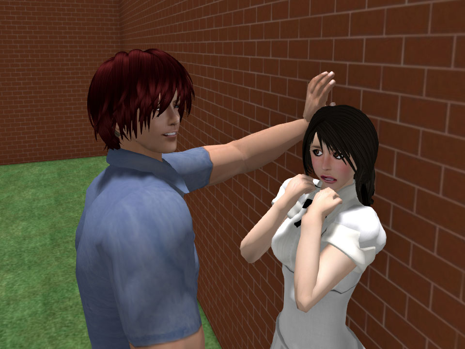 壁ドンの例